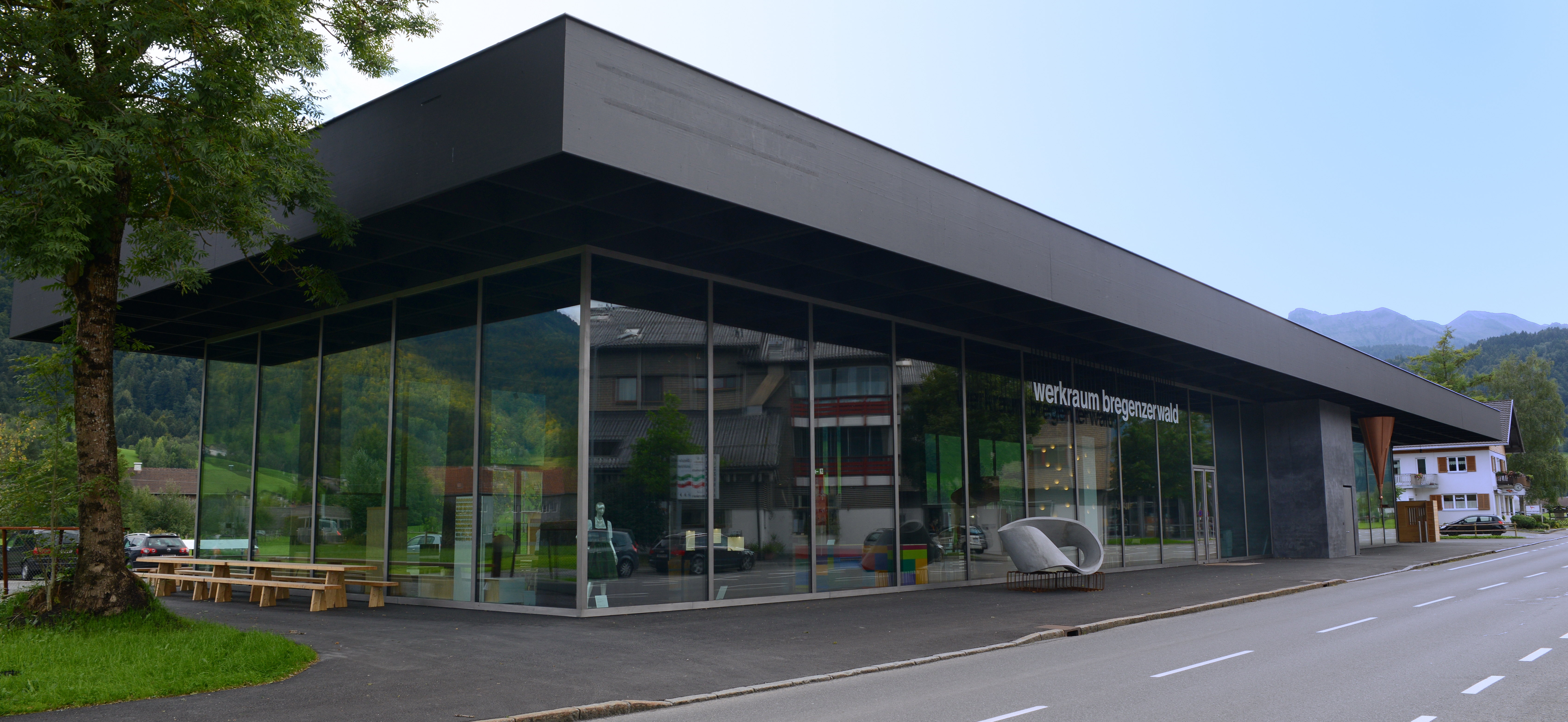 Der Schweizer Architekt Peter Zumthor erhielt 2008 den Planungsauftrag für einen Versammlungsort und für ein Schaufenster zur Handwerkskultur des Werkraum Bregenzerwald. Das Haus steht an der B200 im Dorfzentrum von Andelsbuch.